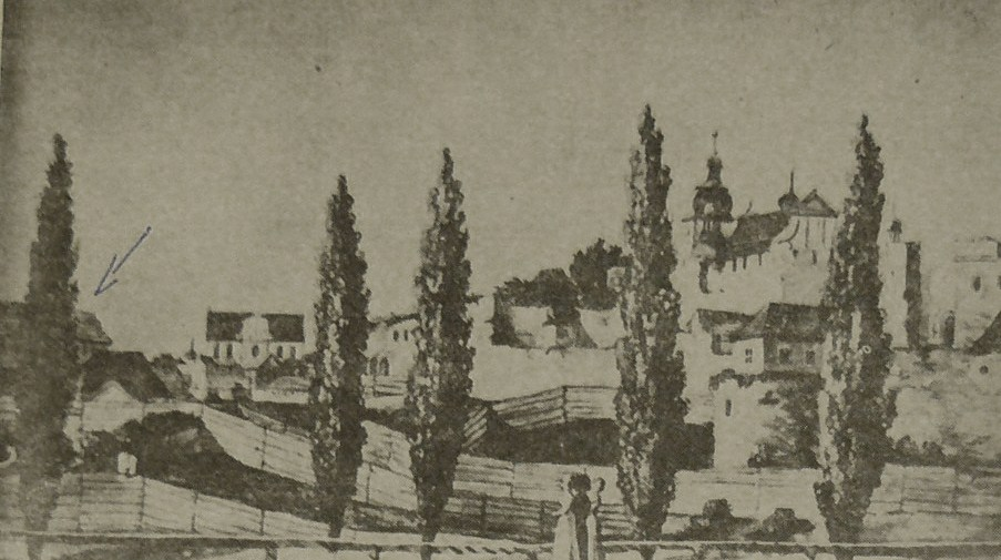 Poznań około roku 1800. Strzałką zaznaczono teatr w ujeżdżalni Geislera.